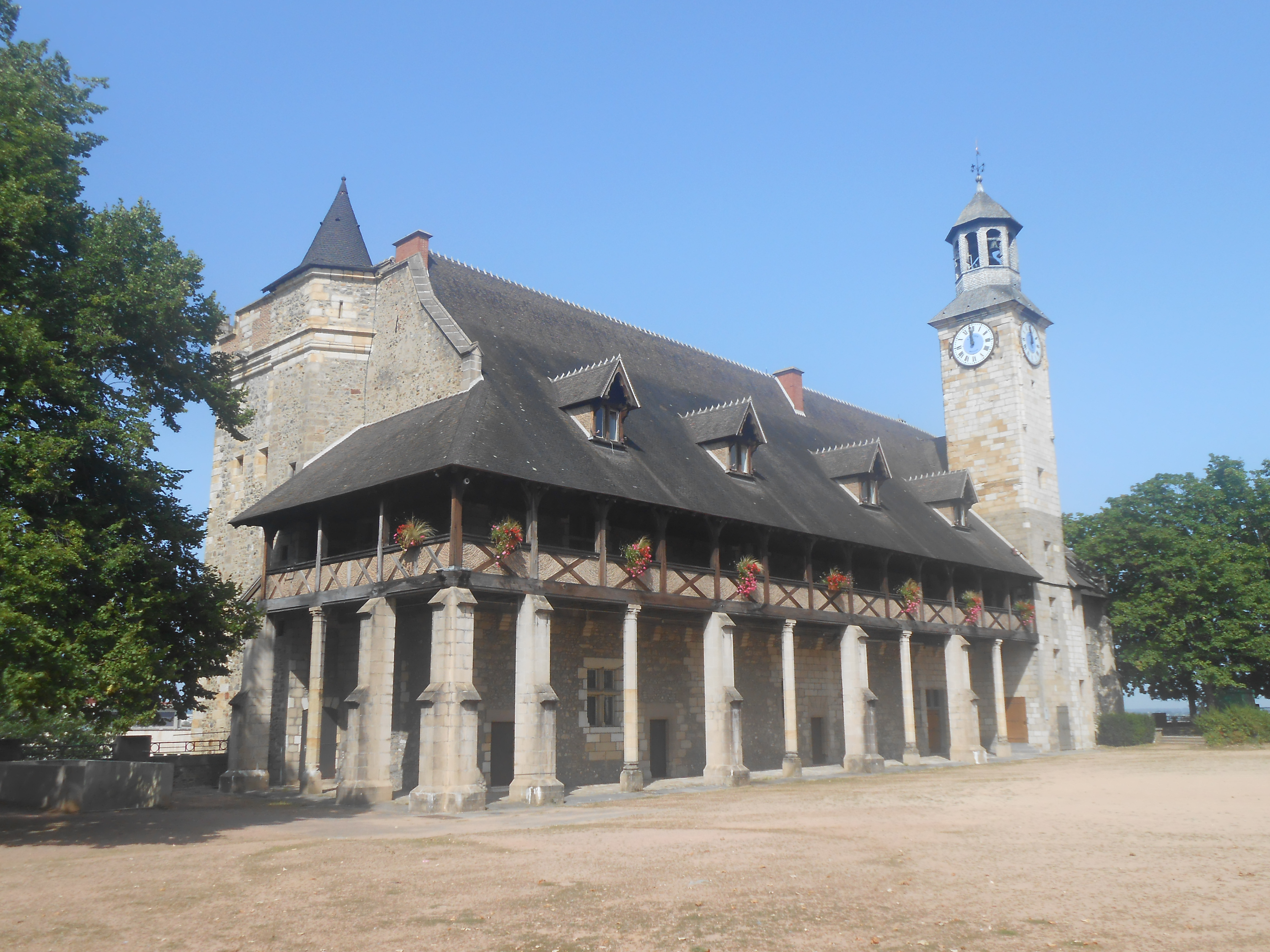 Logis du château des Ducs de Bourbon à Montluçon, côté cour.